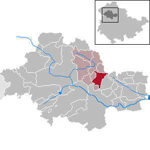 Neunheilingen in Thuringia - Unstrut-Hainich-Kreis